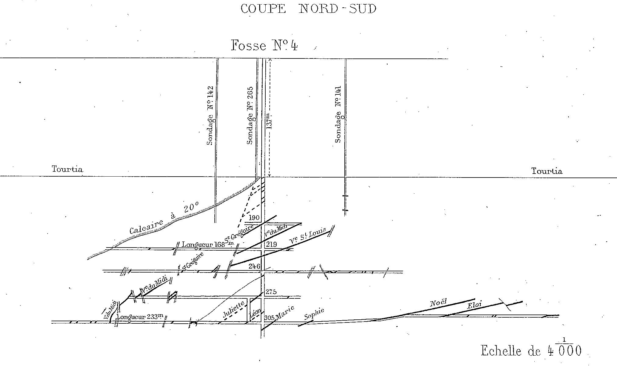 Coupe nord-sud à la fosse de la Compagnie des mines de Cauchy-à-la-Tour vers 1880.